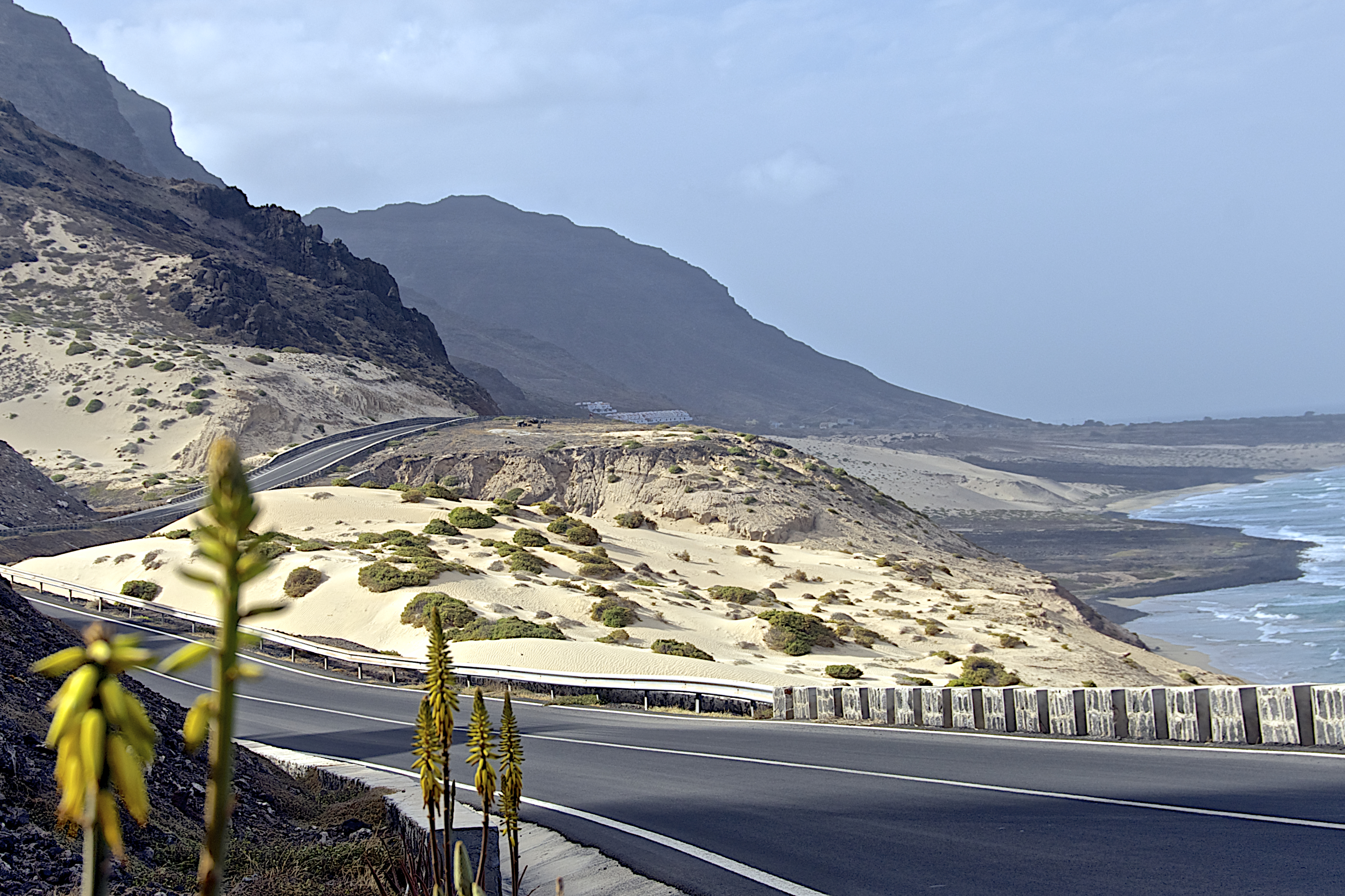 Estr. Baía das Gatas - Calhau, Cape Verde